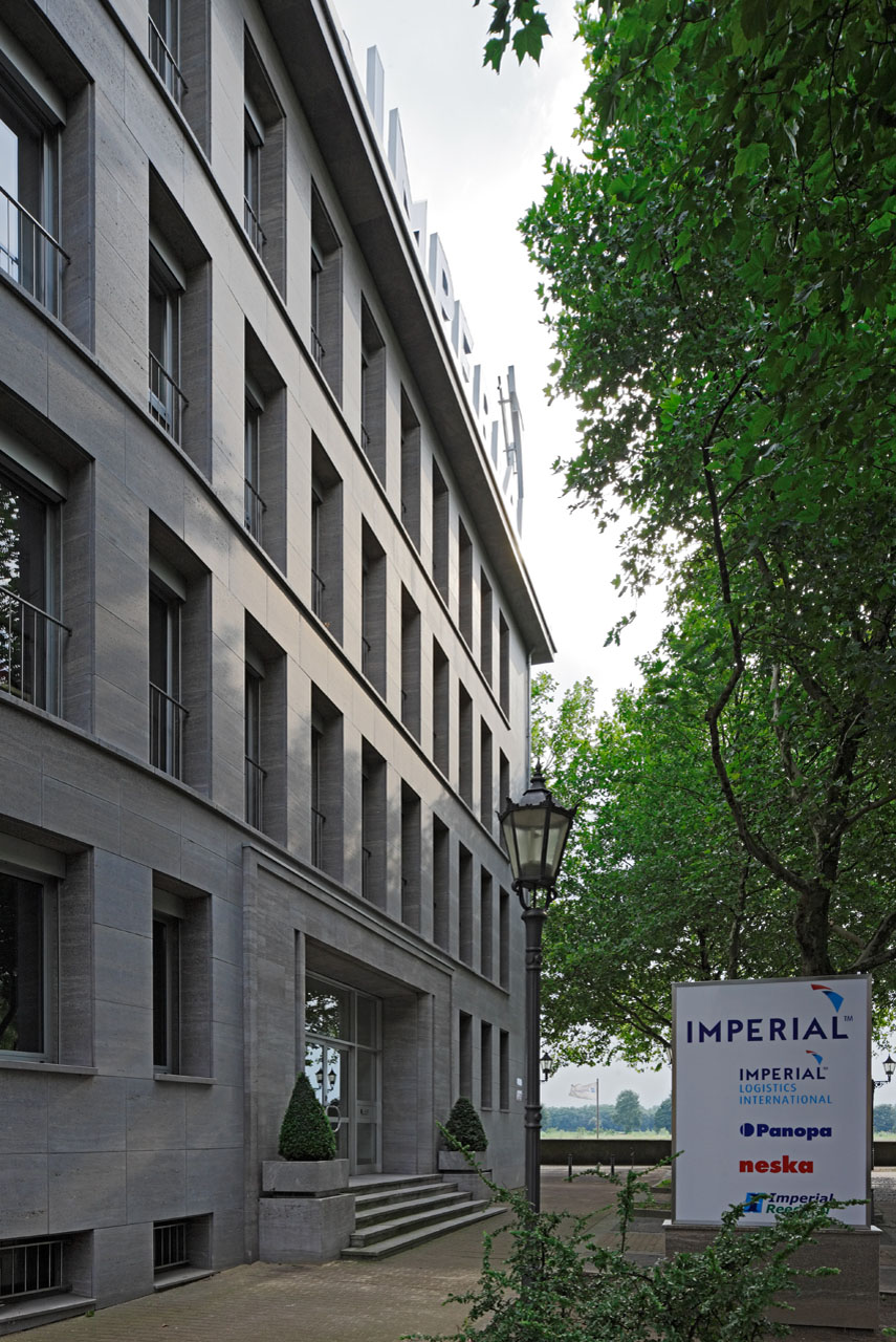 Firmengebäude, Imperial Logistics International, Duisburg